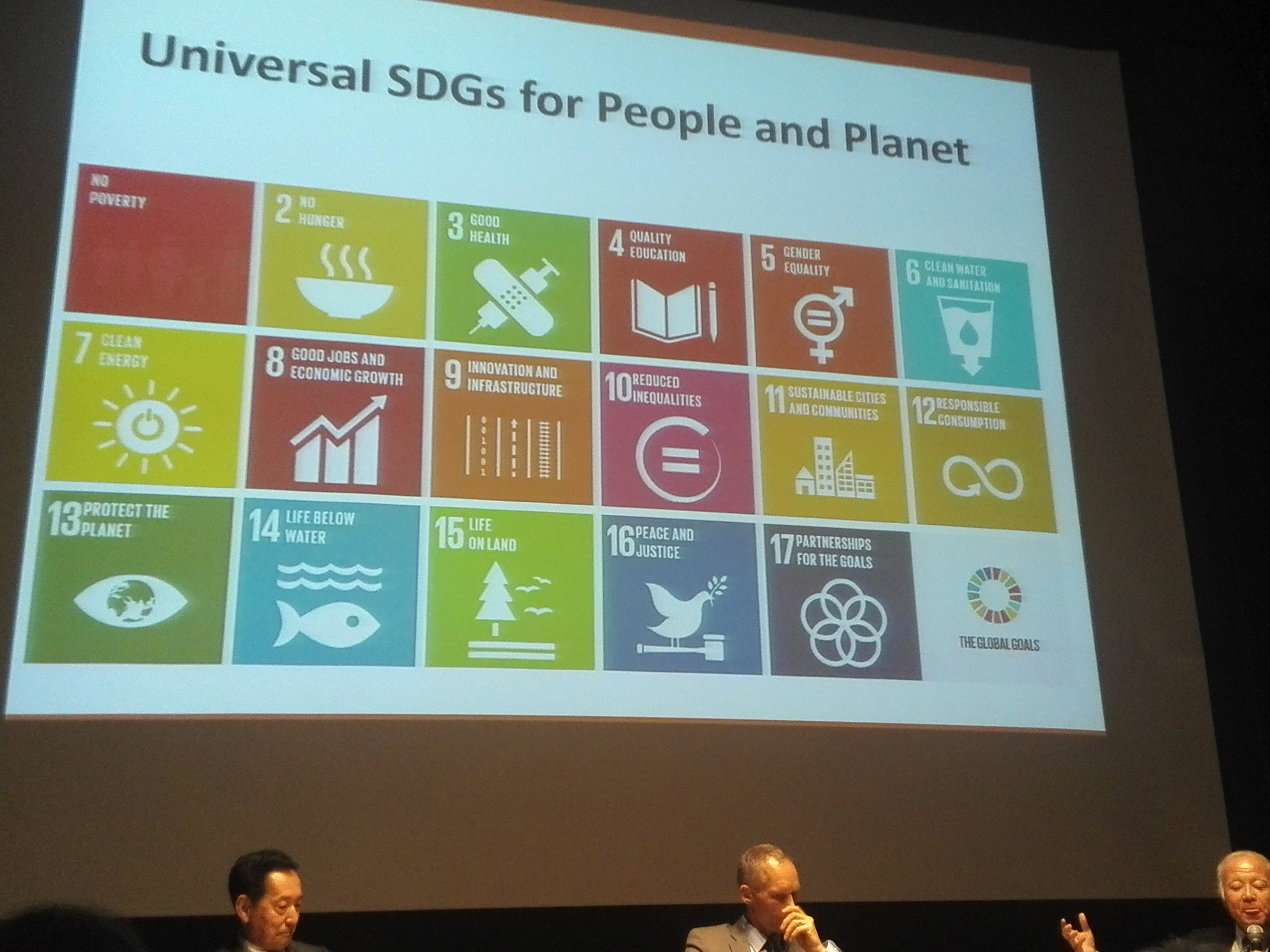 2015年9月に国連で採択された持続可能な開発目標(SDGｓ)について。日本科学未来館において。